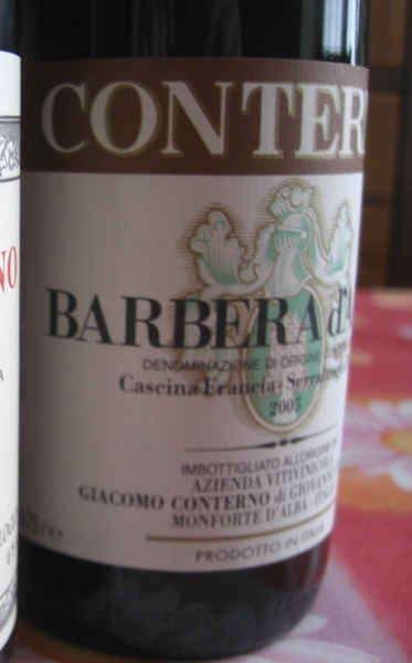 Giacomo Conterno Barbera d'Alba 2005